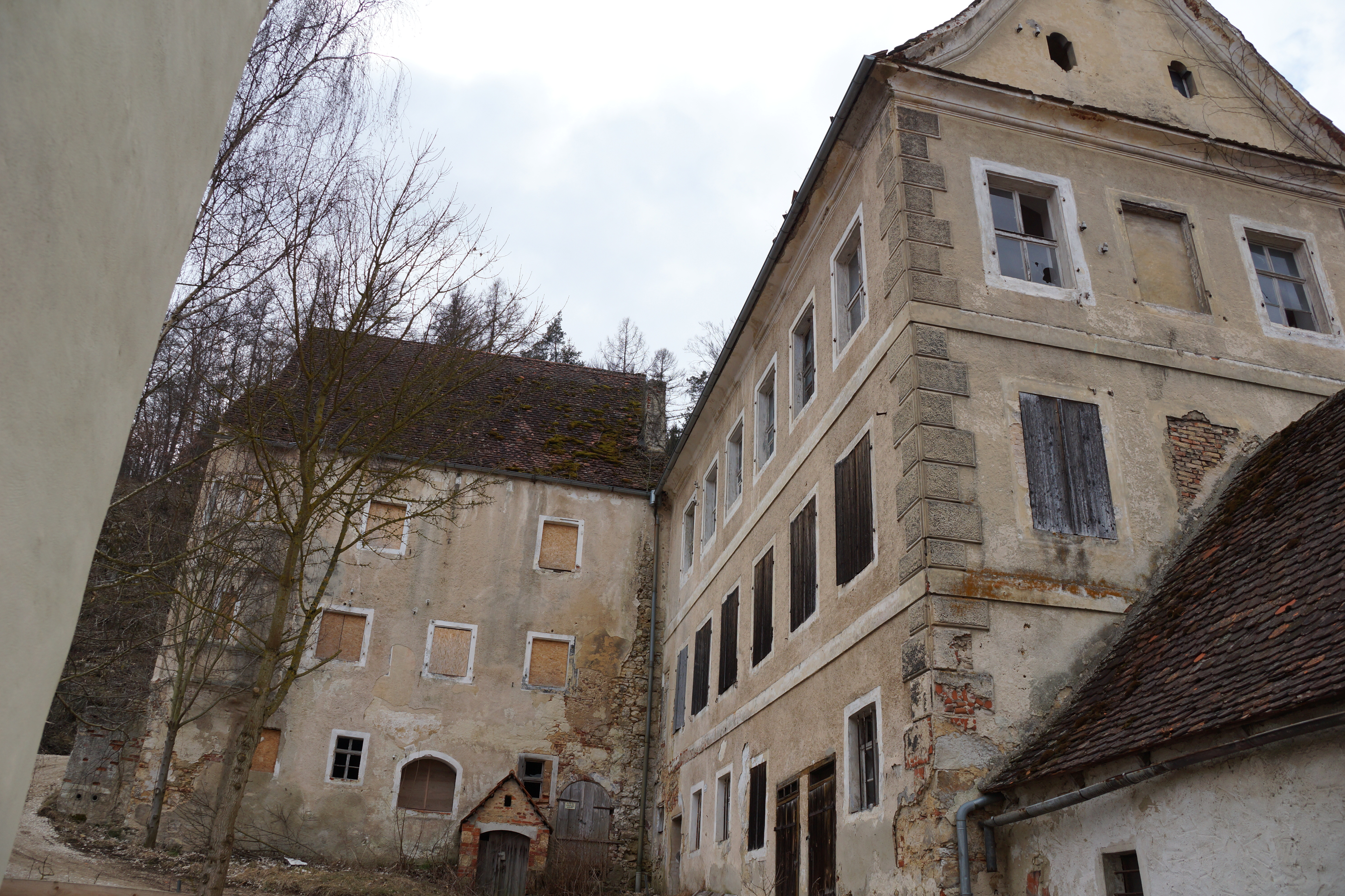 Der sogenannte Pfleghof in Hohenburg im Lauterachtal